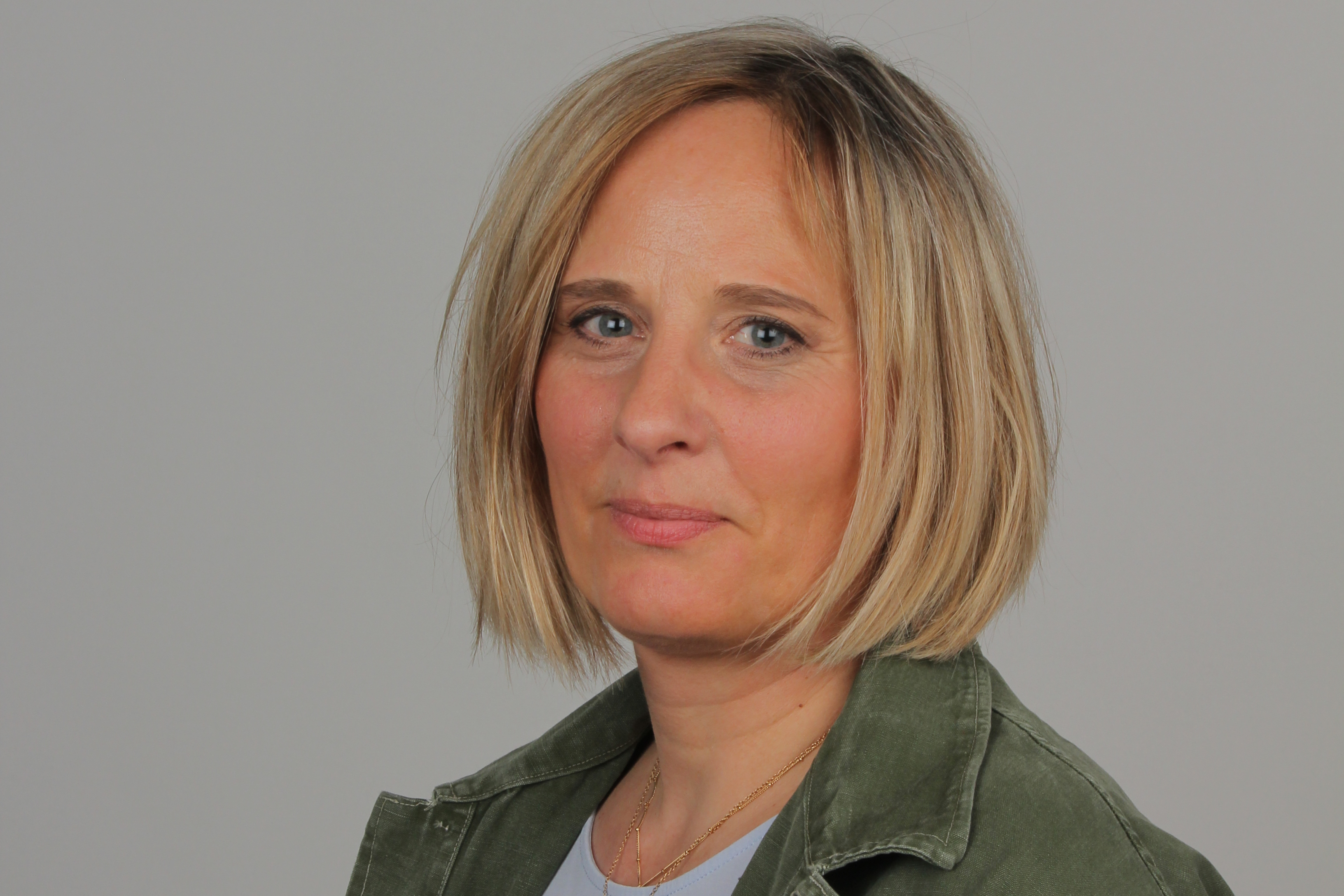 Fotoprojekt Österreichischer Film 2016: Regisseurin und Kamerafrau Astrid Heubrandtner